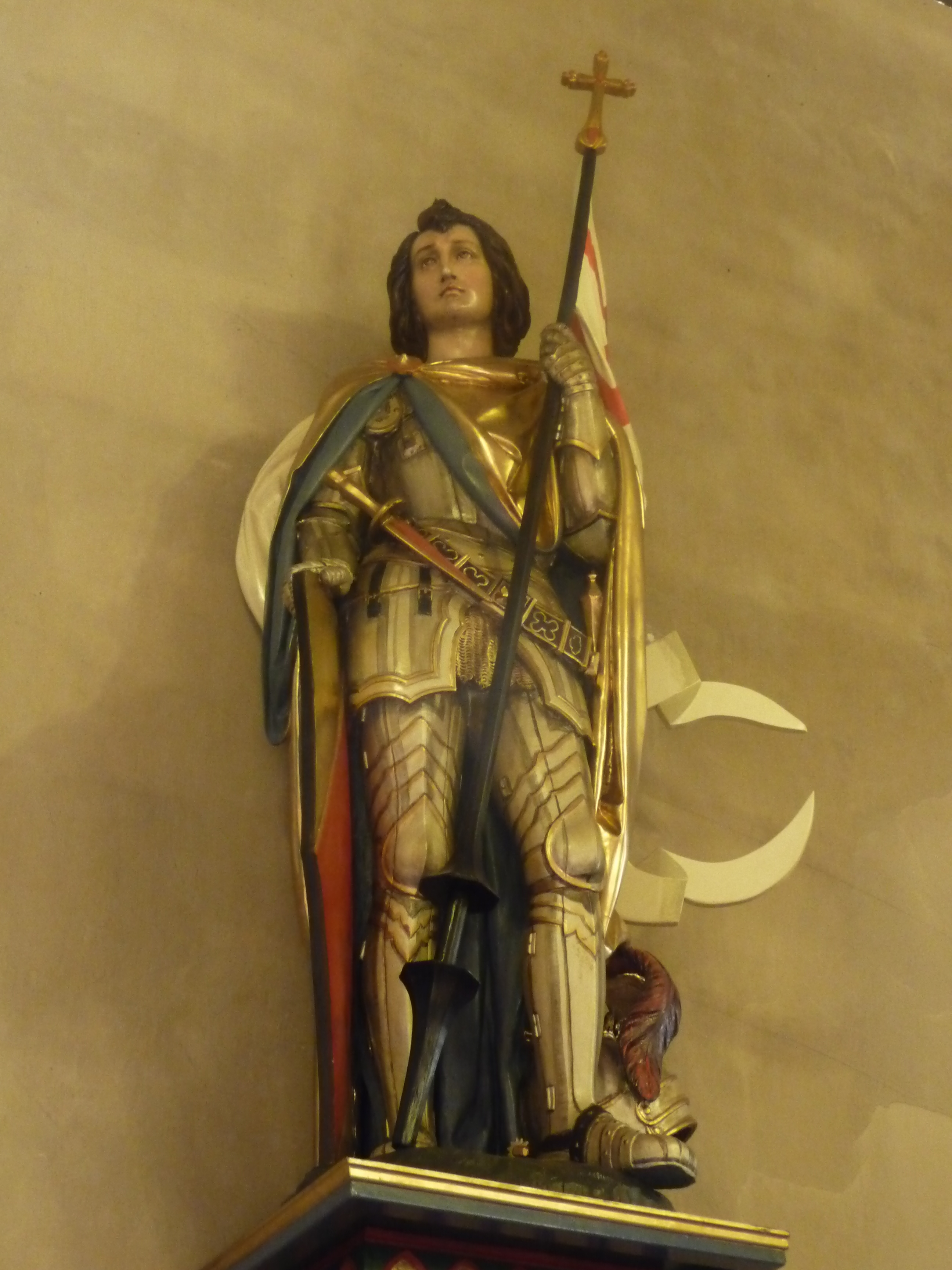 Statue des Seligen Bernhard von Baden-Baden, Teil eines 1865/1866 gestifteten Bernhardus-Altars, welcher 1967 aus der Stiftskirche in Baden-Baden entfernt wurde.